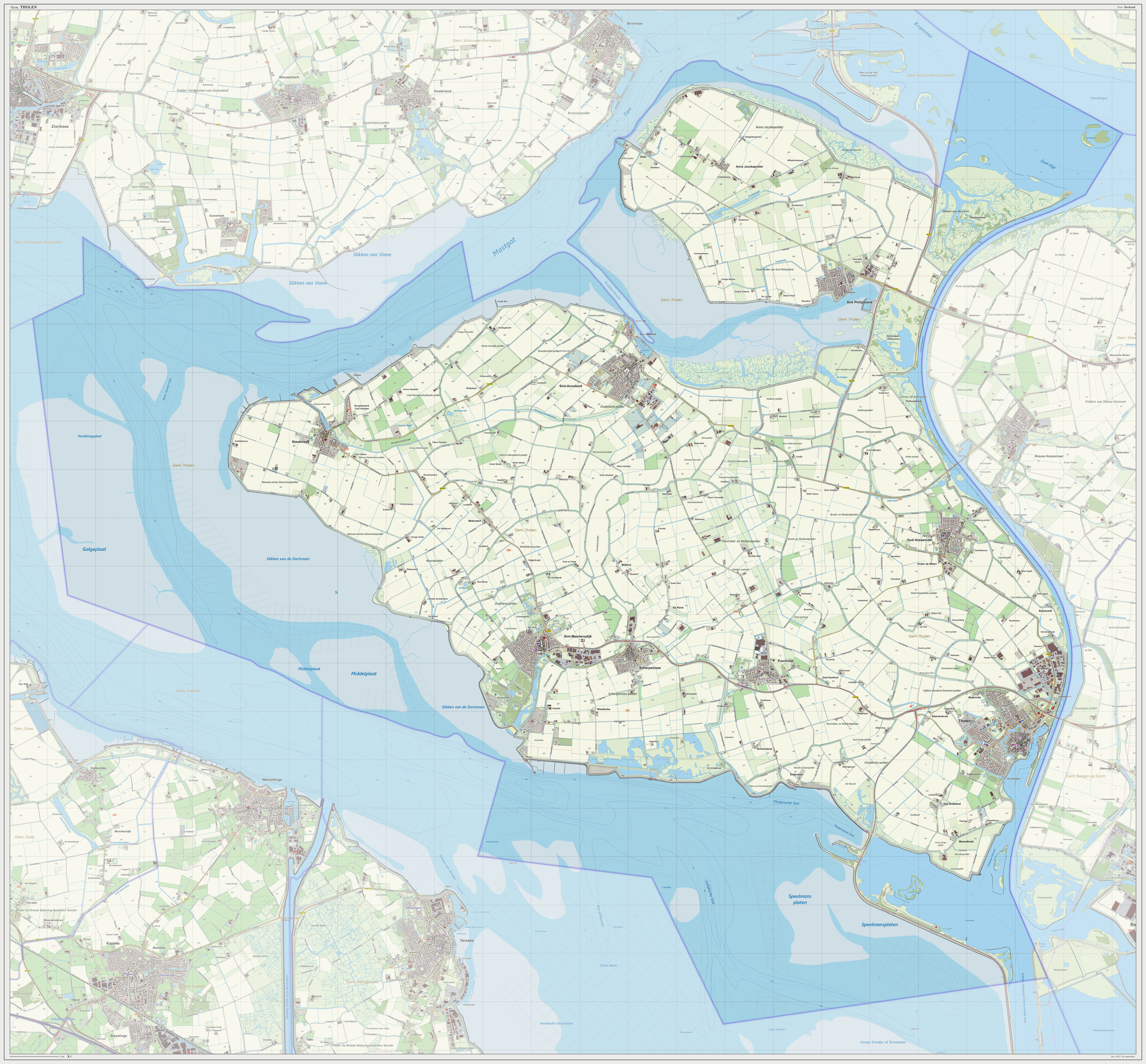 Topografische gemeentekaart. Resolutie: 300 pixels/km. Kaartbeeld samengesteld met de open geodata van de Top10NL en Top25namen (Basisregistratie Topografie, Kadaster 30-nov-2013), o.b.v. Creative Commons BY licentie. Gebouwvlakken uit Open Geodata BAG extract (8-dec-2013). Wegen uit de OpenStreetMap (15-dec-2013). Samenstelling en kleurenschema: Jan-Willem van Aalst, met QGIS2 en Adobe Photoshop. Zie ook de Legenda.